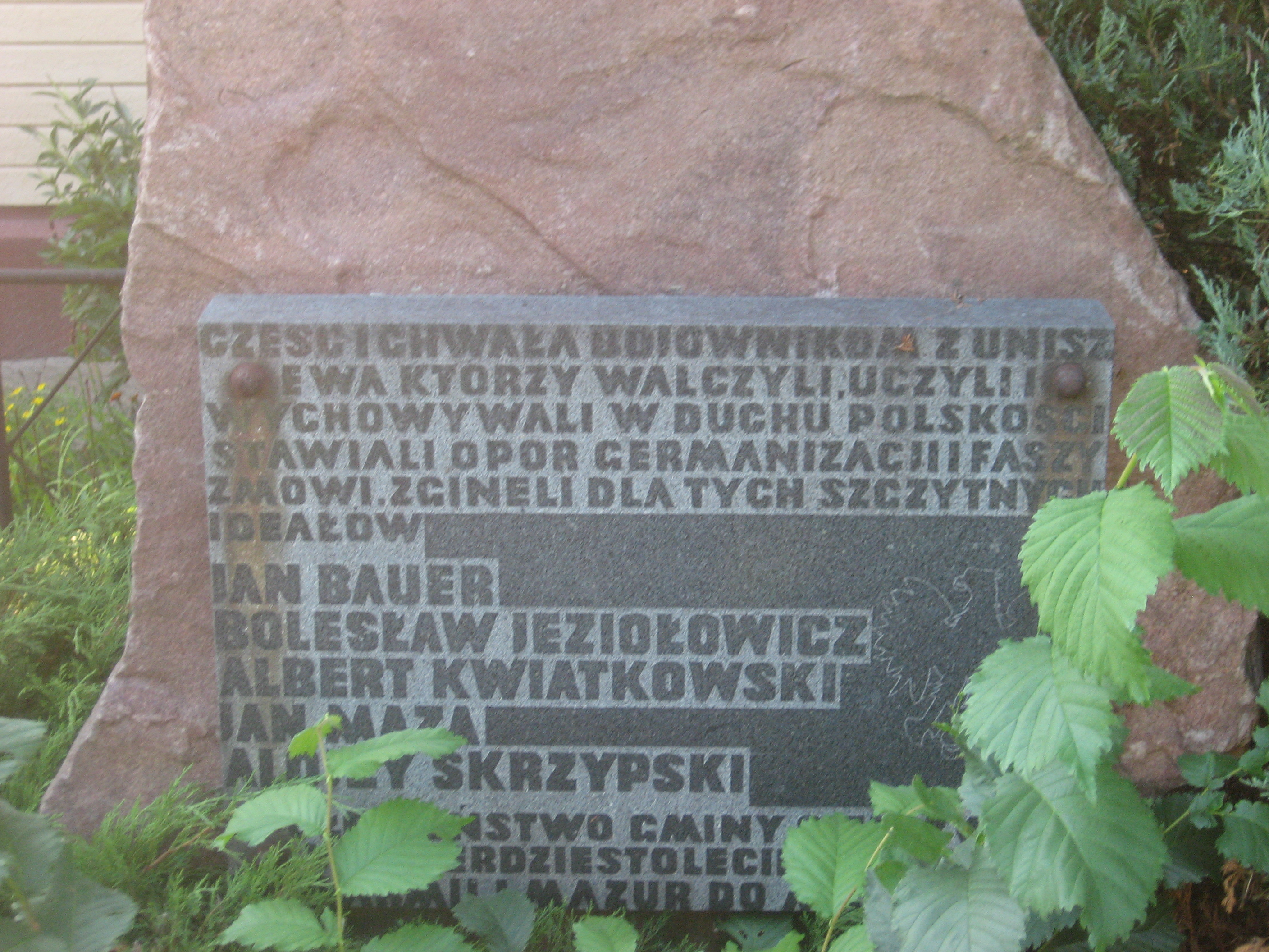 Tablica upamietniająca ludzi tworzących szkołę polską w Unieszewie.